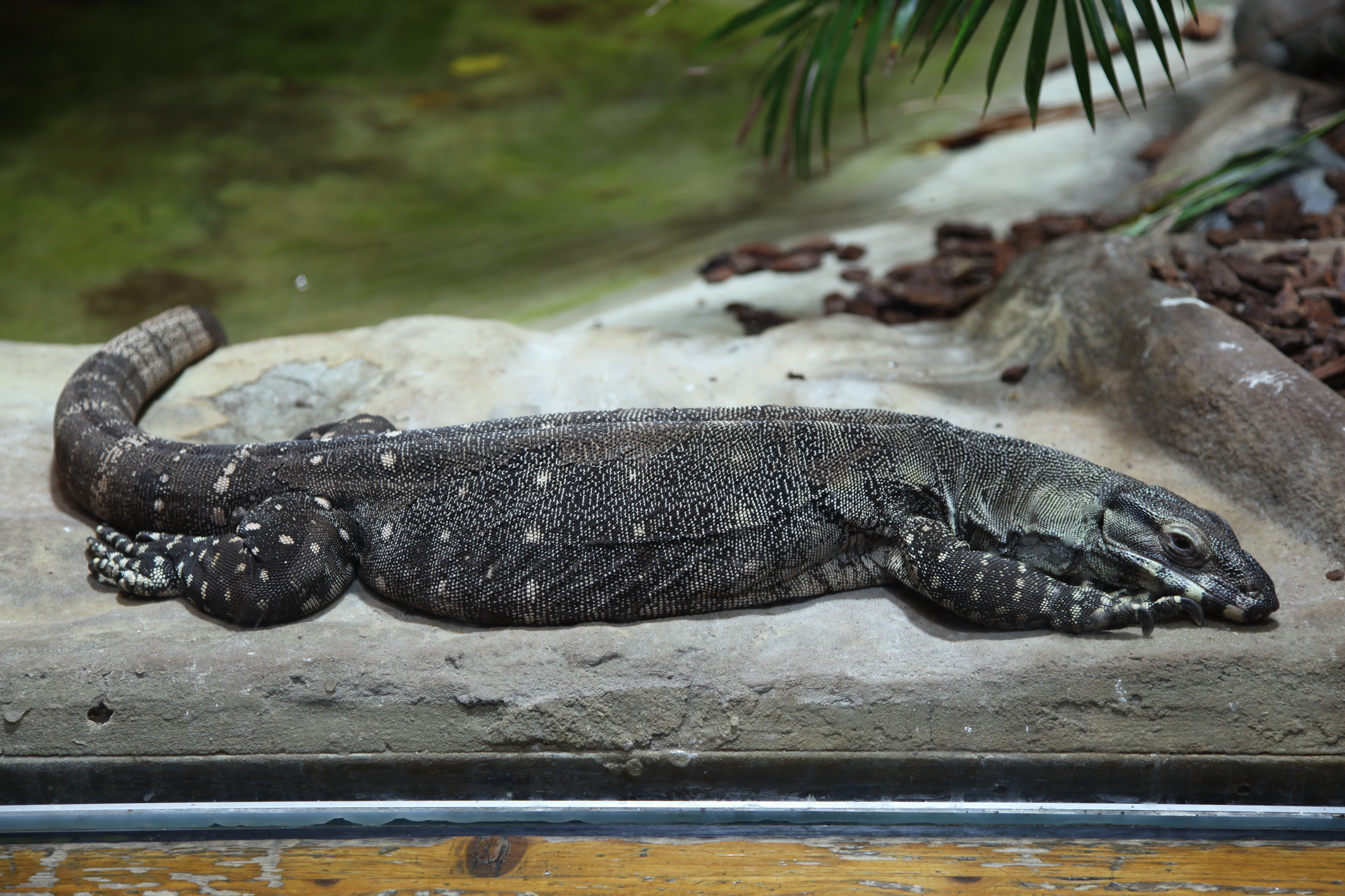 Varanus varius im Tierpark an der Klinikstraße in Bochum